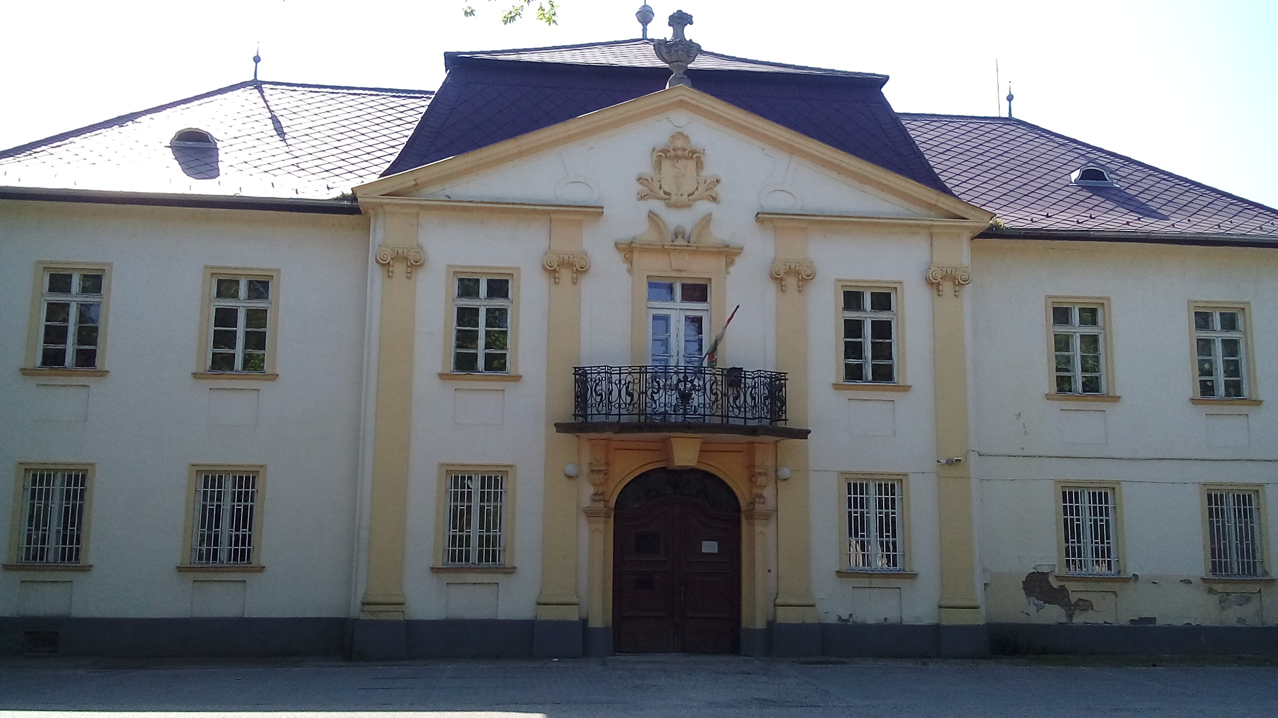 Műemlék épület, ID 14925. Az egykori Főszolgabírói Hivatal, majd a Weöres Sándor Általános Iskola régi épülete. - Pest megye, Gyömrő, Központi park, Szabadság tér 2/b This is a photo of a monument in Hungary. Identifier: 14925